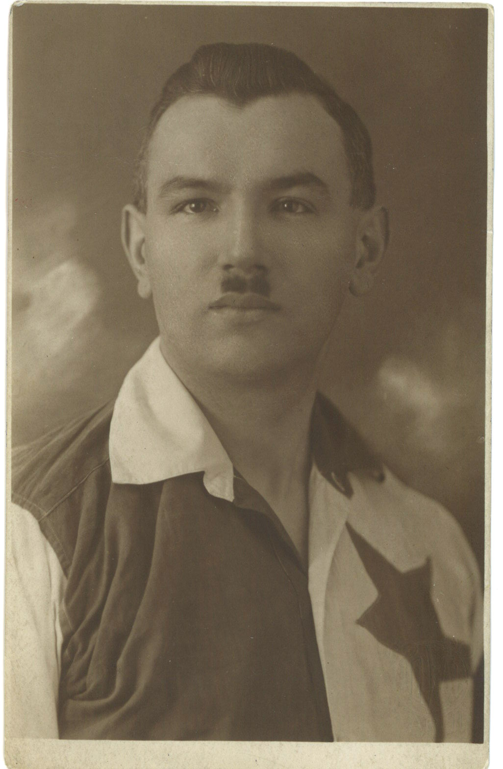 Fotbalista Slavie Karel Nytl